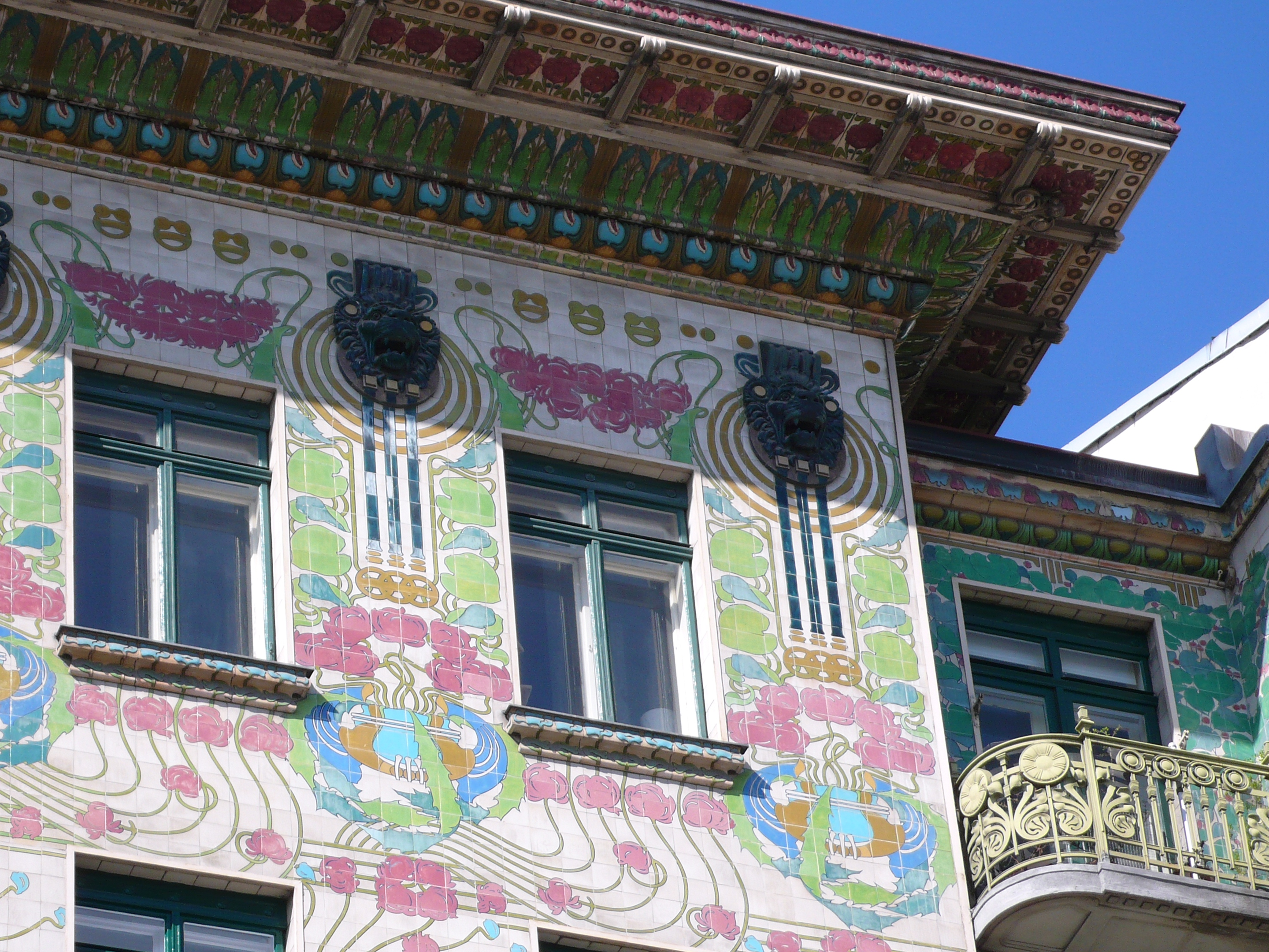 Wien, Majolikahaus Wienzeile 40, Detail; Otto Wagner